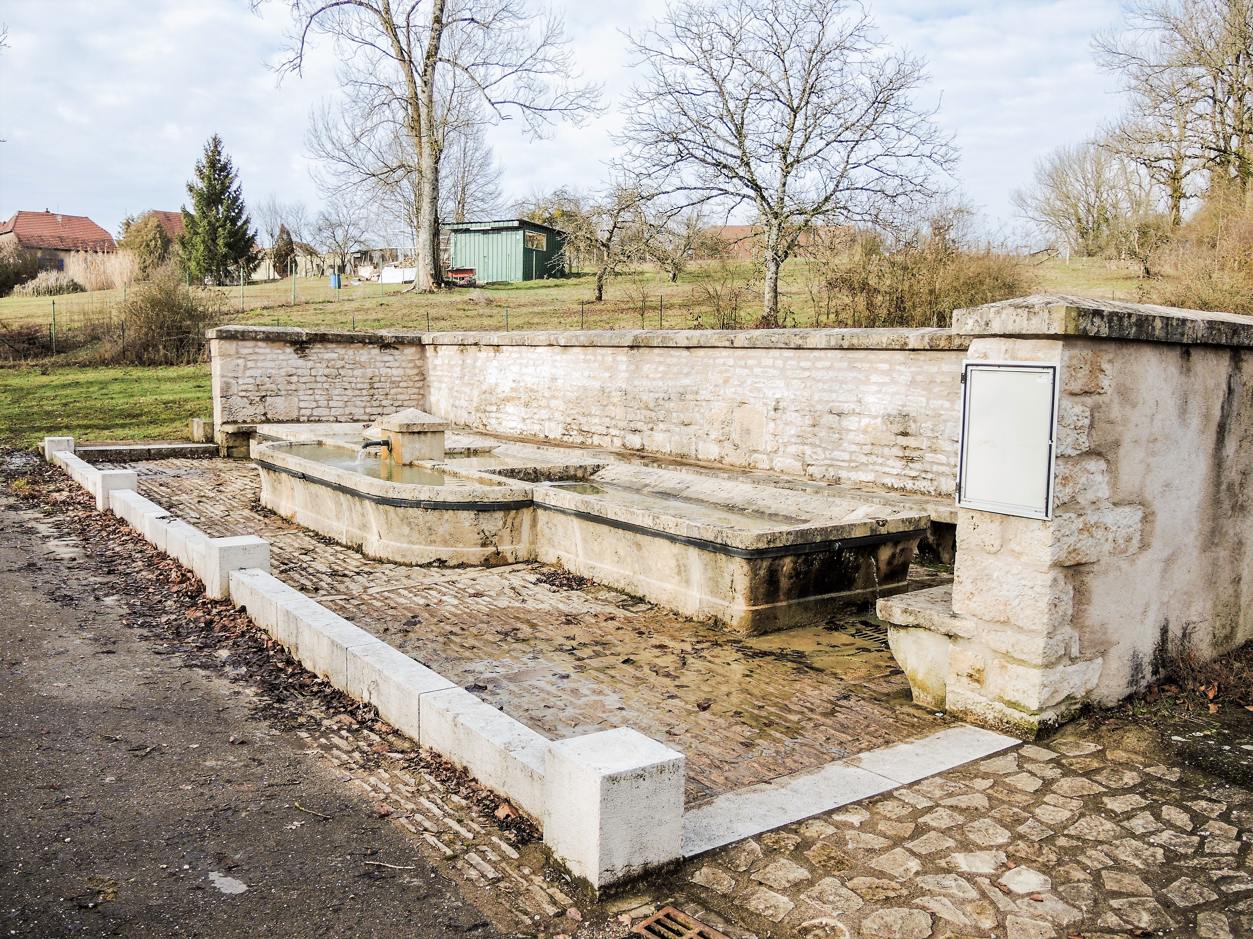 Lavoir.